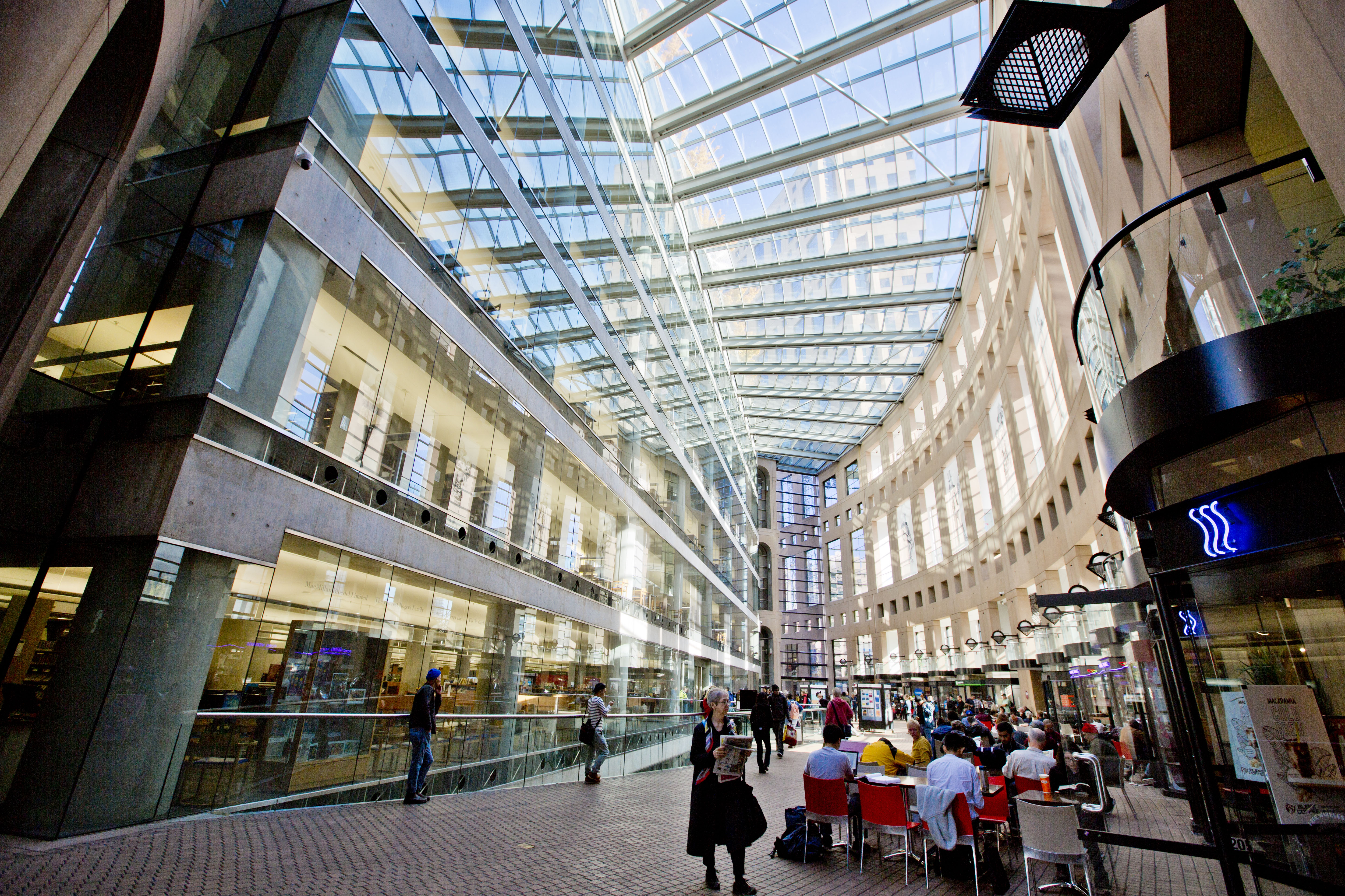 Vancouver Public Central Library